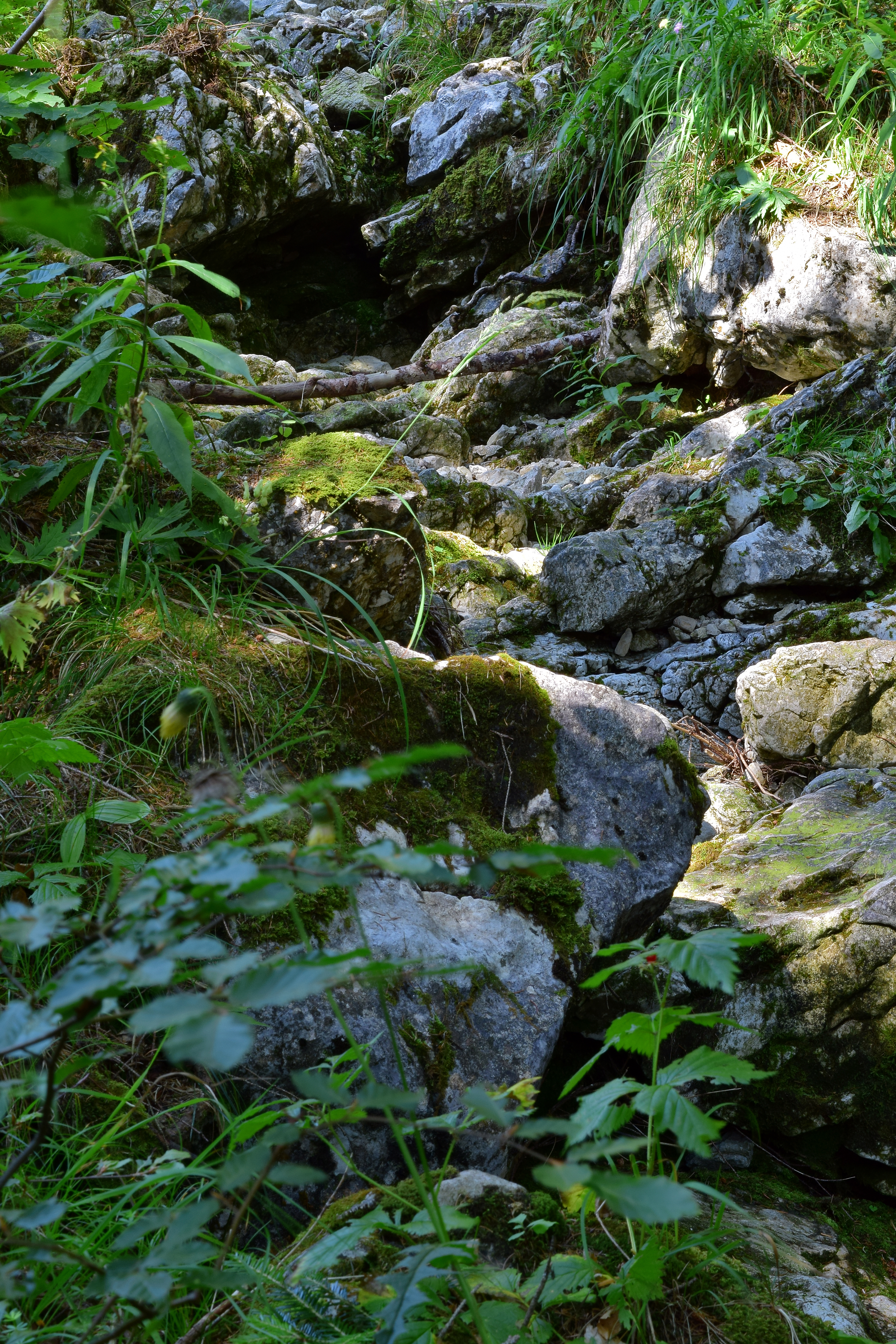 Erlaufursprung samt Felsgebilde im Umkreis von 20 Meter This media shows the natural monument in Lower Austria with the ID LF-056.